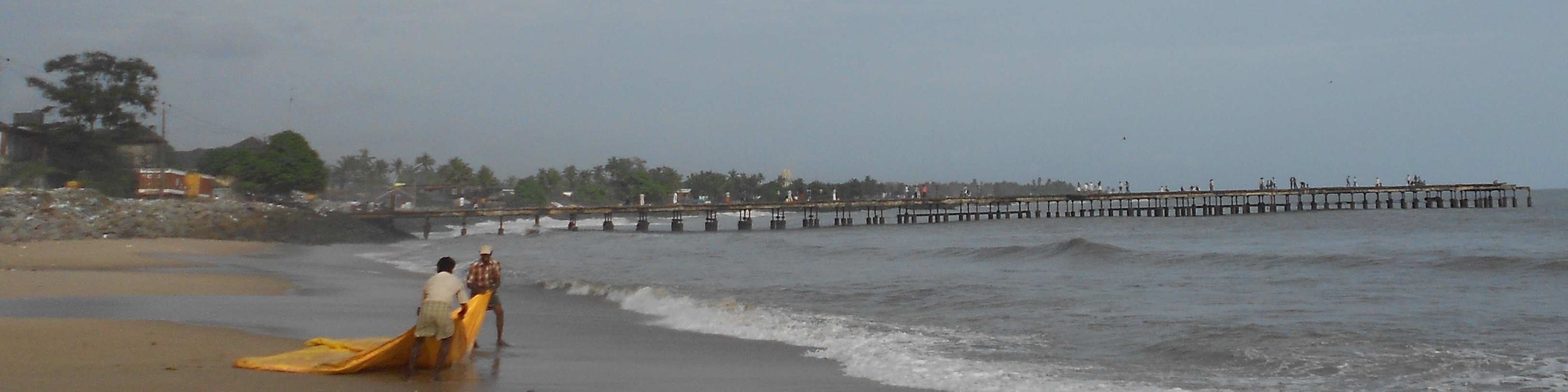 തലശ്ശേരി കടൽപ്പാലം